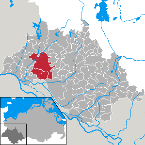 Former Amt Vellahn in Mecklenburg-Vorpommern - district Ludwigslust